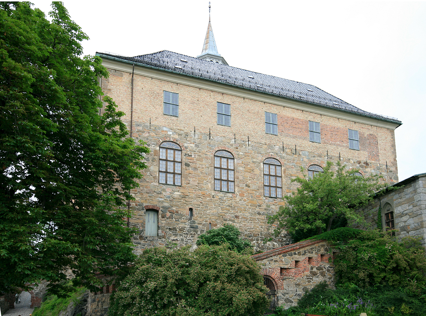 Sørfløyen, Akershus slott, Oslo. Bygd ca. 1300.